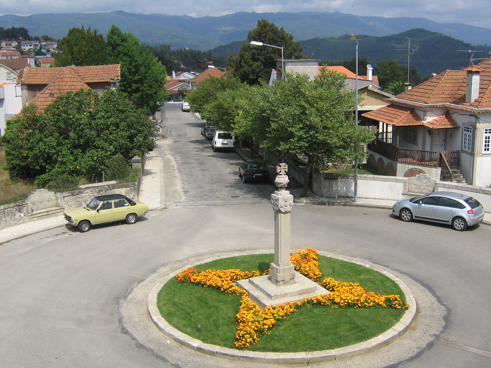 Rotunda Centenários em Oliveira de Frades (distrito de Viseu, Portugal).